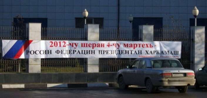 Баннер, информирормирующий население о предстоящих выборах Президента России на чеченском языке